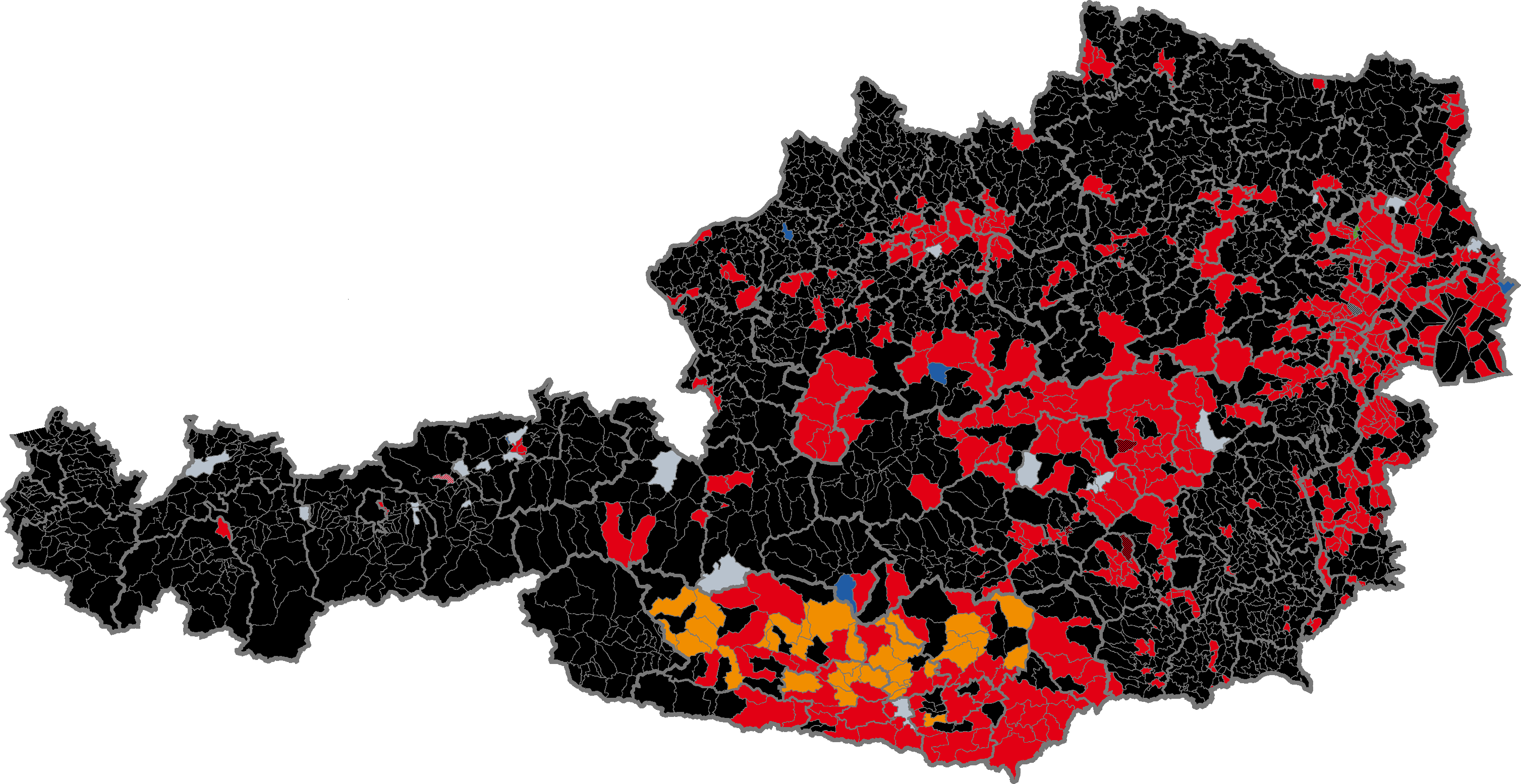 Gemeindekarte Österreichs, in der Farbe der Partei, die bei den Wahlen zum Europäischen Parlament die relative Stimmenmehrheit erreicht hat